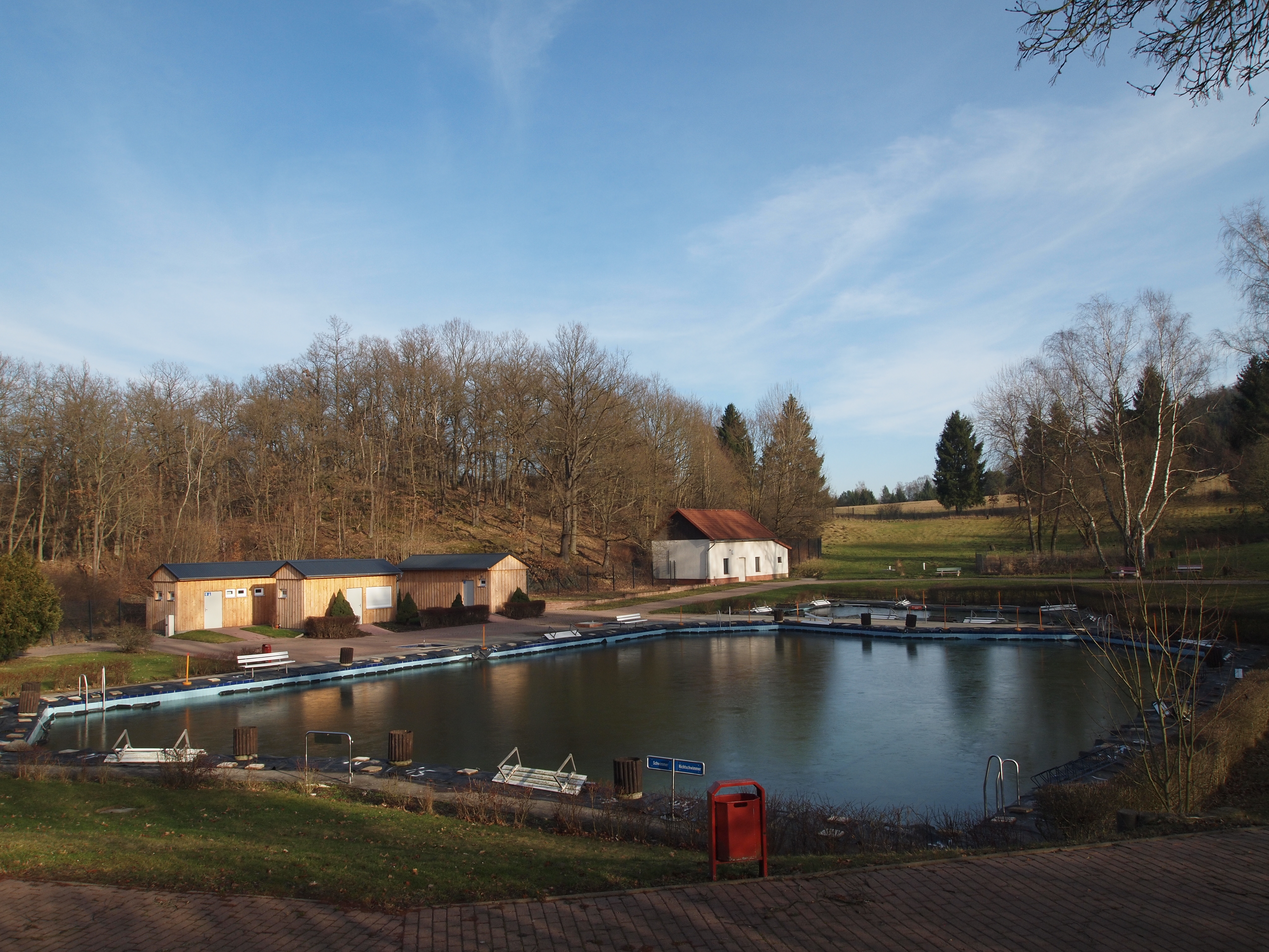 Altenbrak (Stadt Thale, Landkreis Harz, Sachsen-Anhalt) Bergschwimmbad